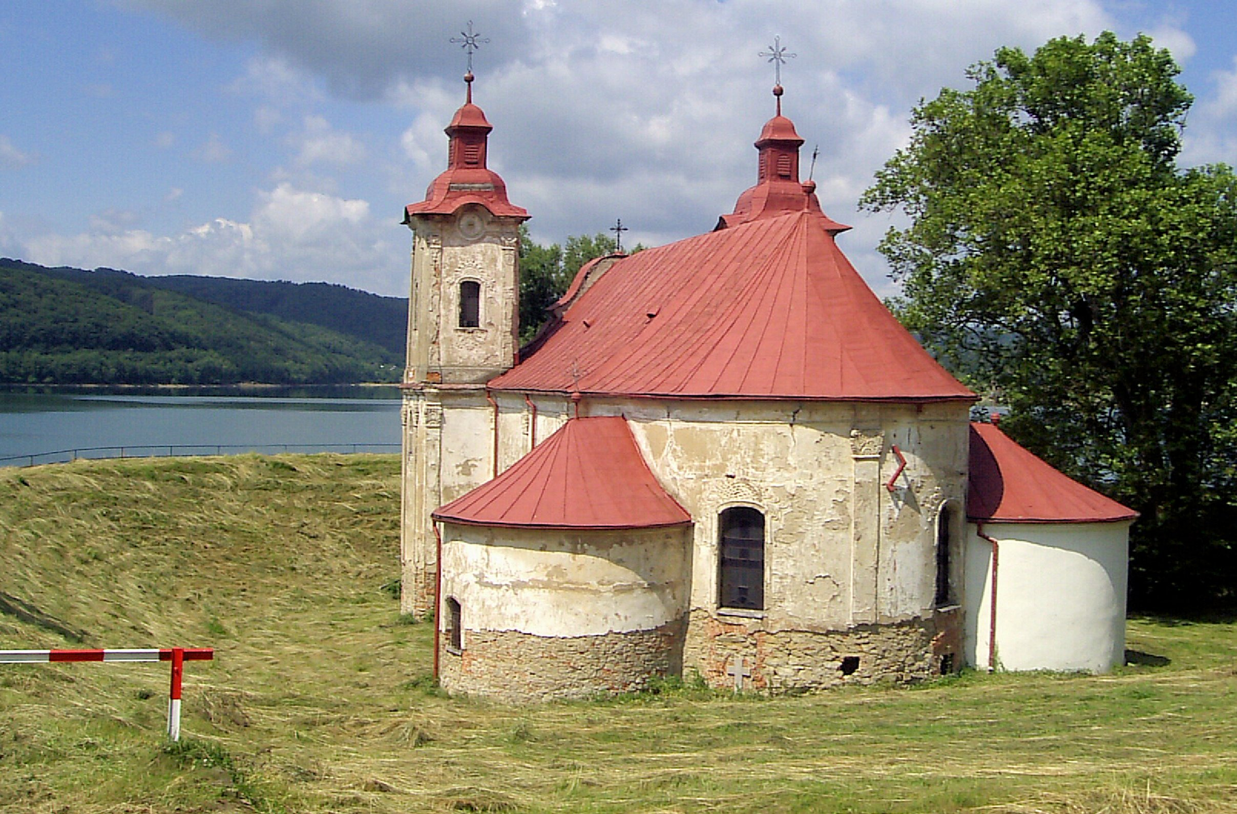 Rímskokatolícky kostol Kelča na vodnú nádrž Veľká Domaša